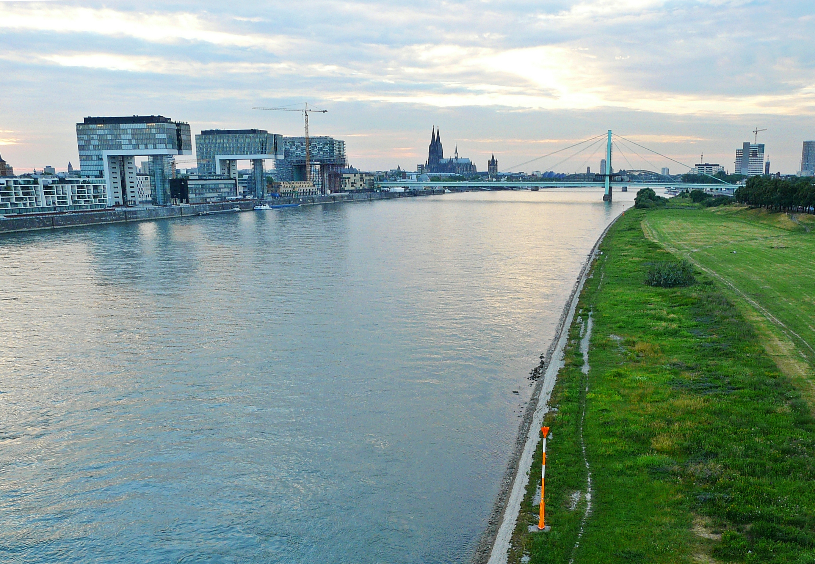 Rhine in Cologne (Köln), Germany. left to right: Rheinauhafen and Kranhäuser buildings, Cathedral and Deutz